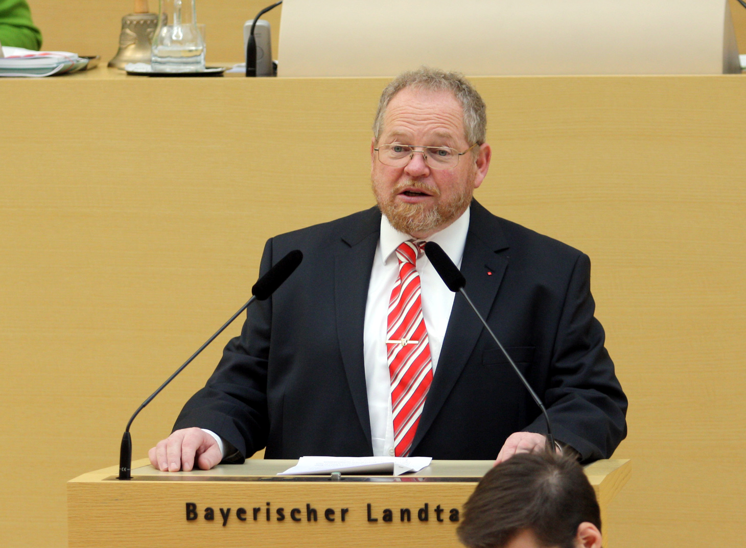 Klaus Adelt, deutscher Kommunal- und Landespolitiker (SPD), seit Herbst 2013 gehört er als Abgeordneter dem Bayerischen Landtag an. Hier während der 6. Sitzung des 17. Bayerischen Landtags am 4.12.2013.